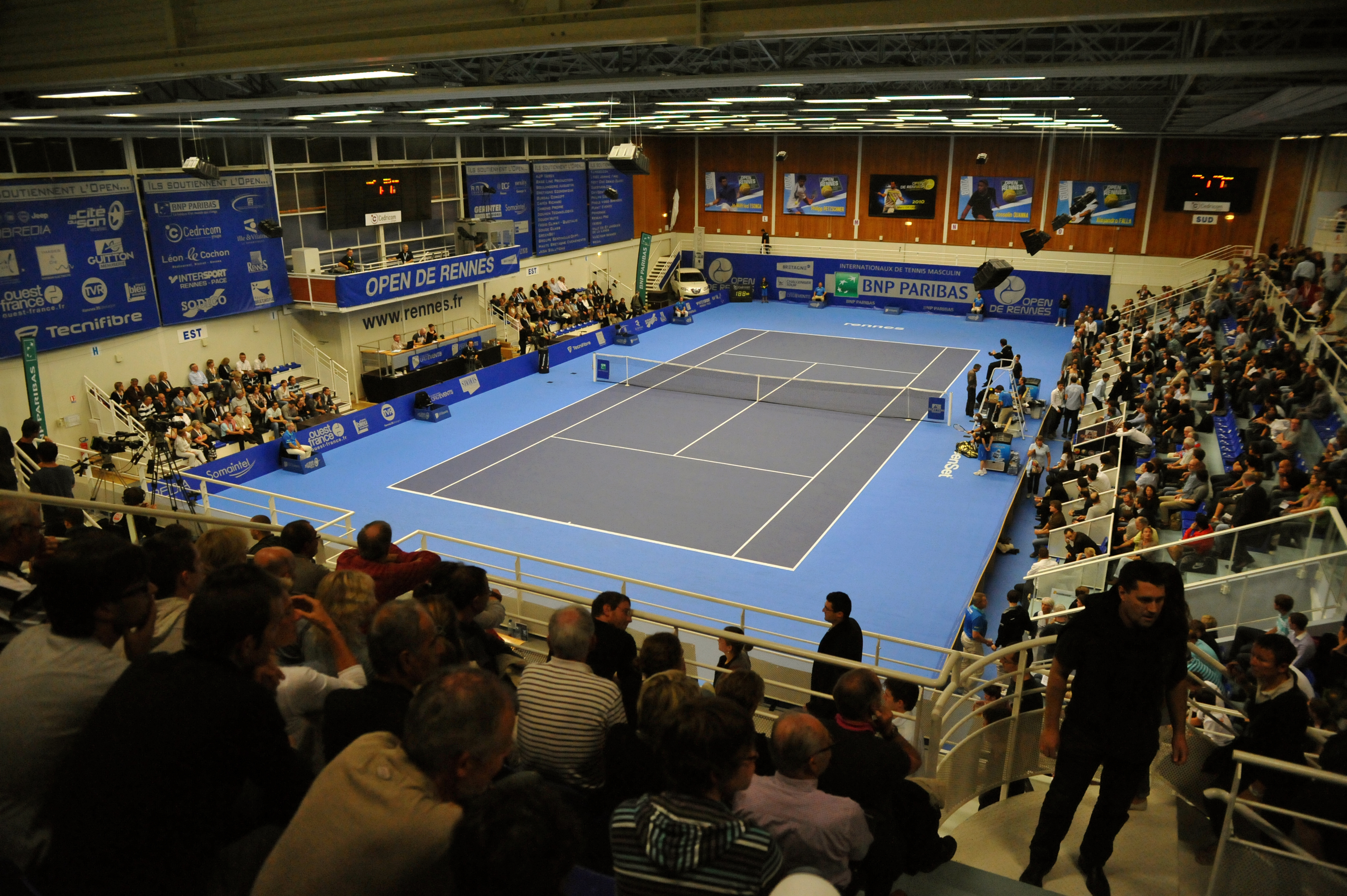 Tennis